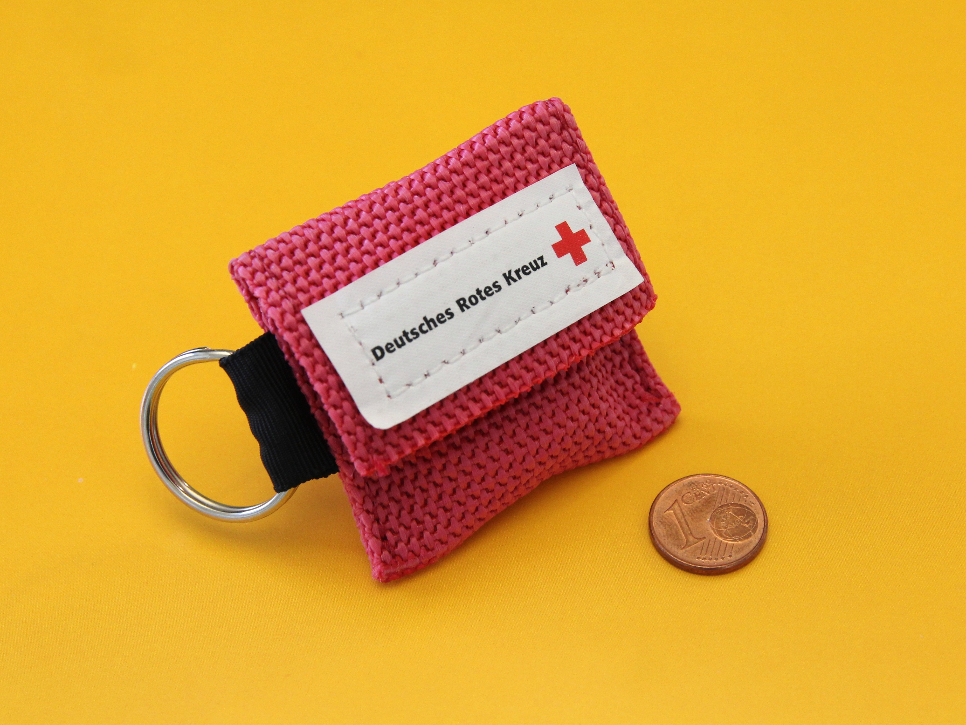 Beatmungsfolie (Life-Key) mit Logo des DRK. In dem abgebildeten (verpackten) Zustand kann der Life-Key als Schlüsselanhänger verwendet werden.